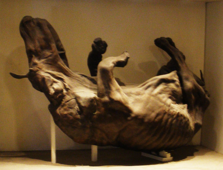 Fossil of Coelodonta, an extinct mammal-- Took the photo at Natural History Museum, London